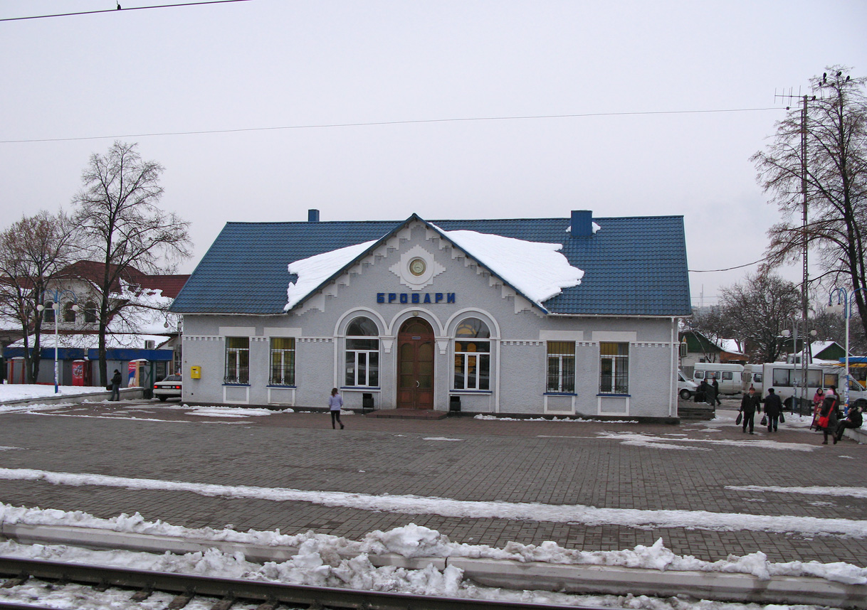 Вокзал ст. Бровари